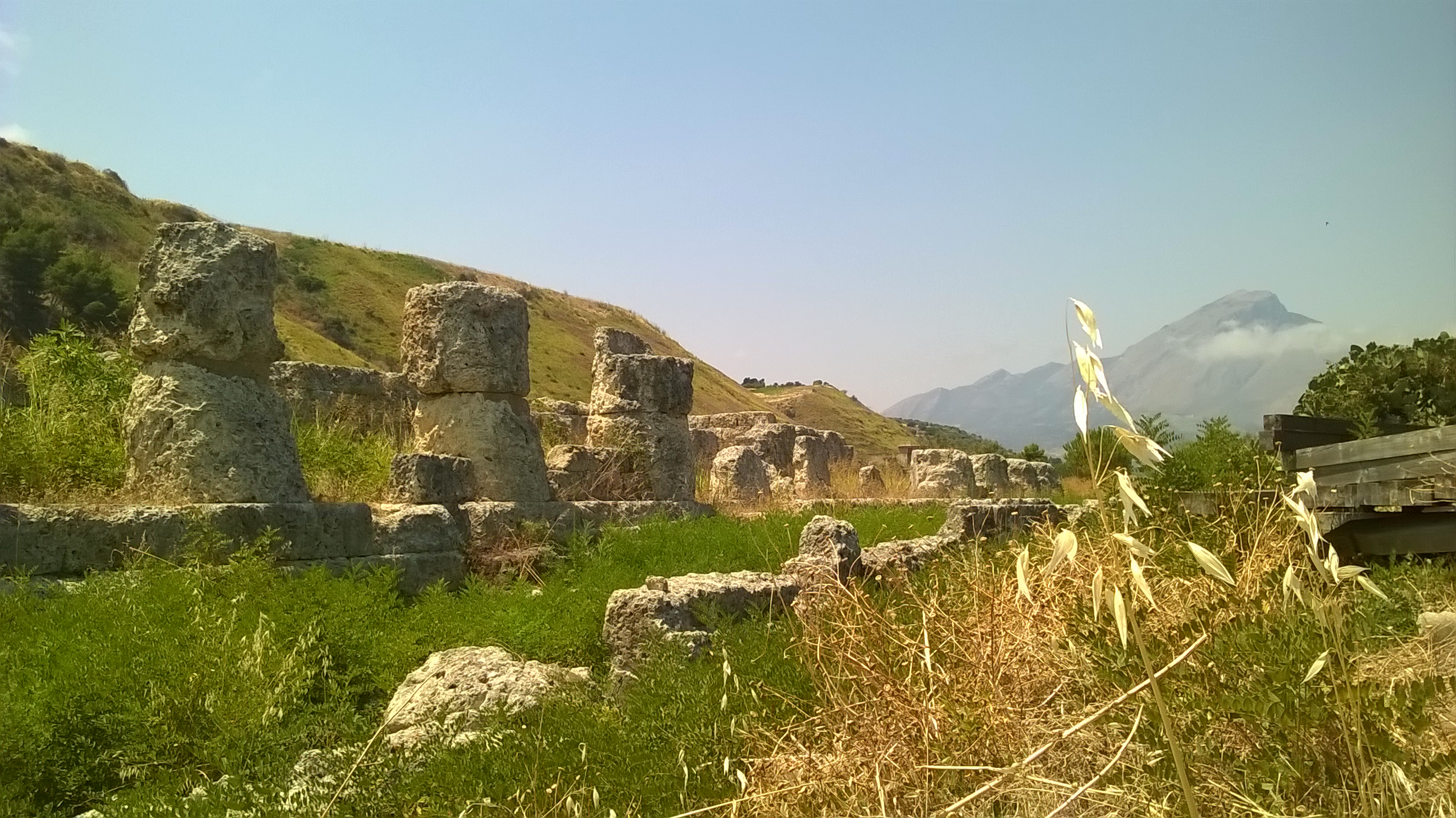 Himera - Sicilia